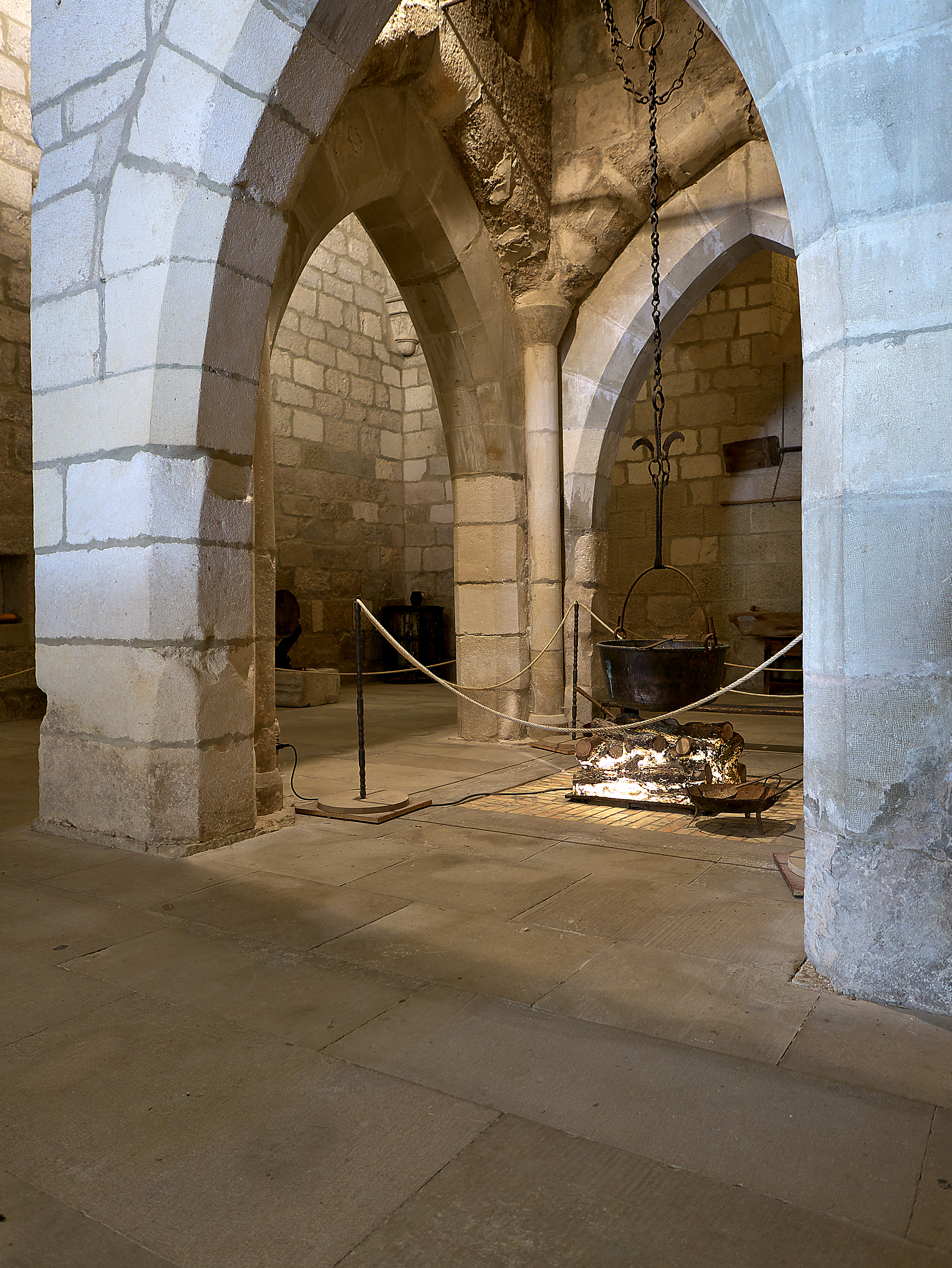 Actual cocina del monasterio.